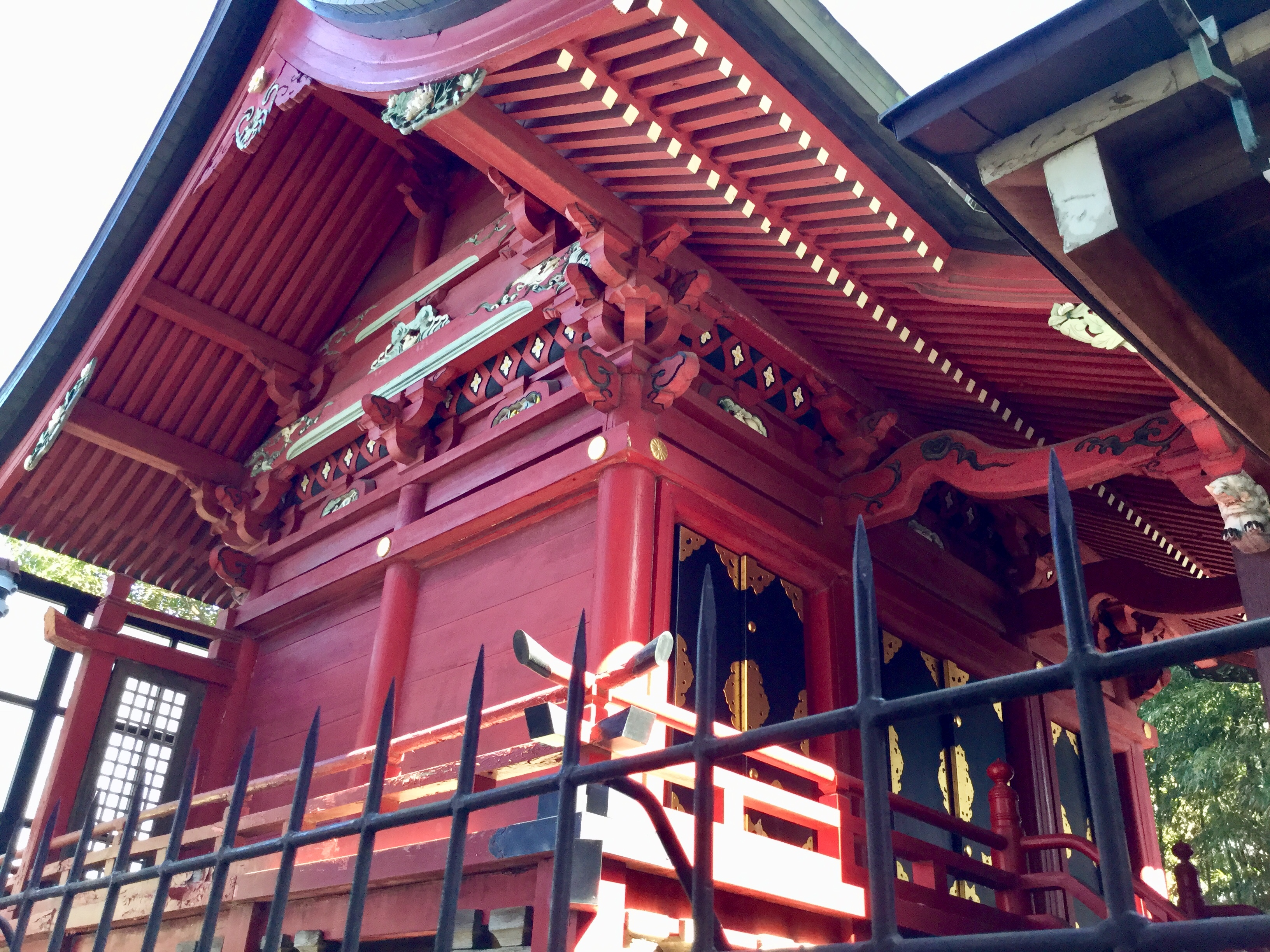 倉見神社の本殿